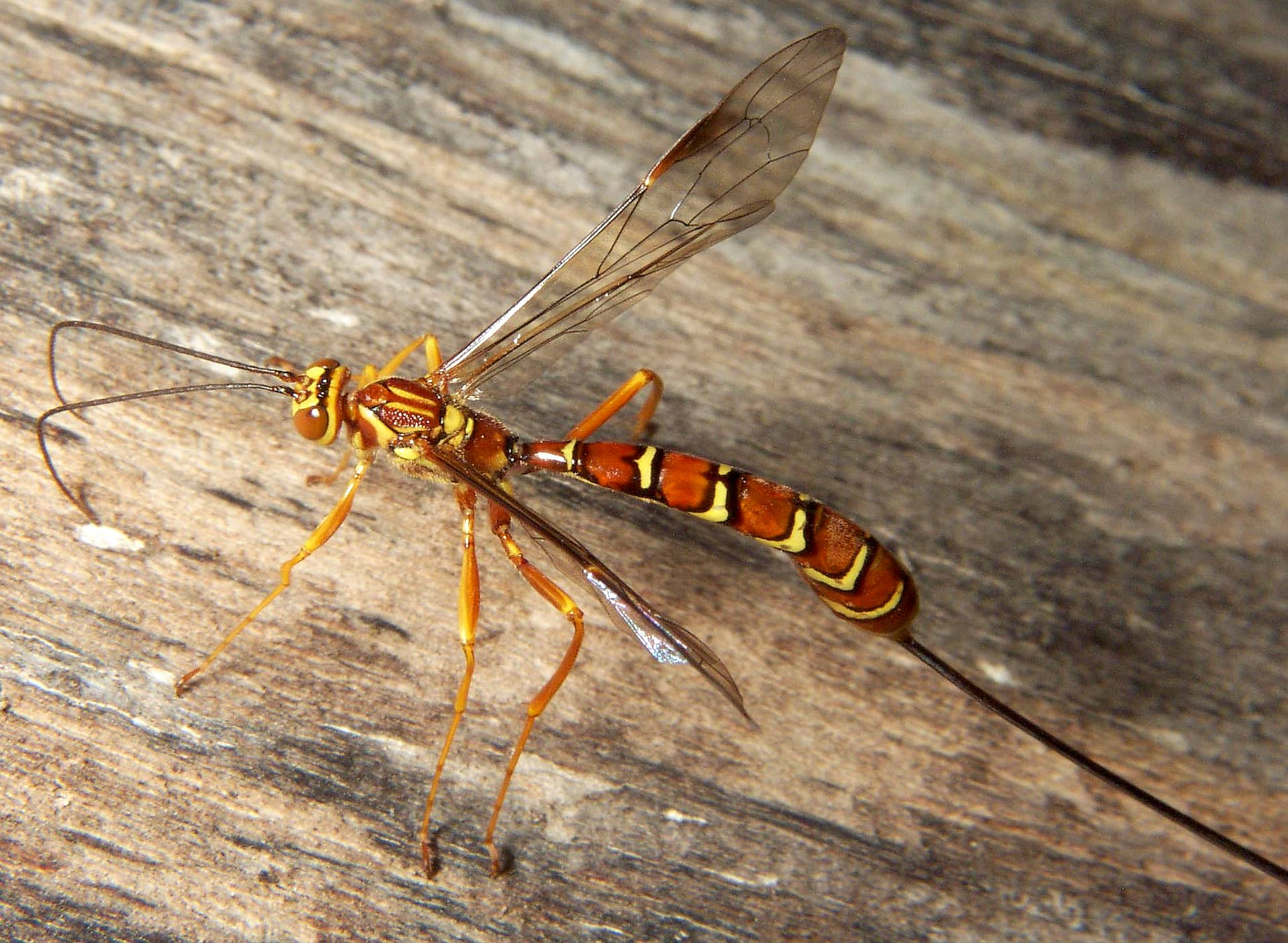 Female Ichneumon wasp, Megarhyssa greenei.